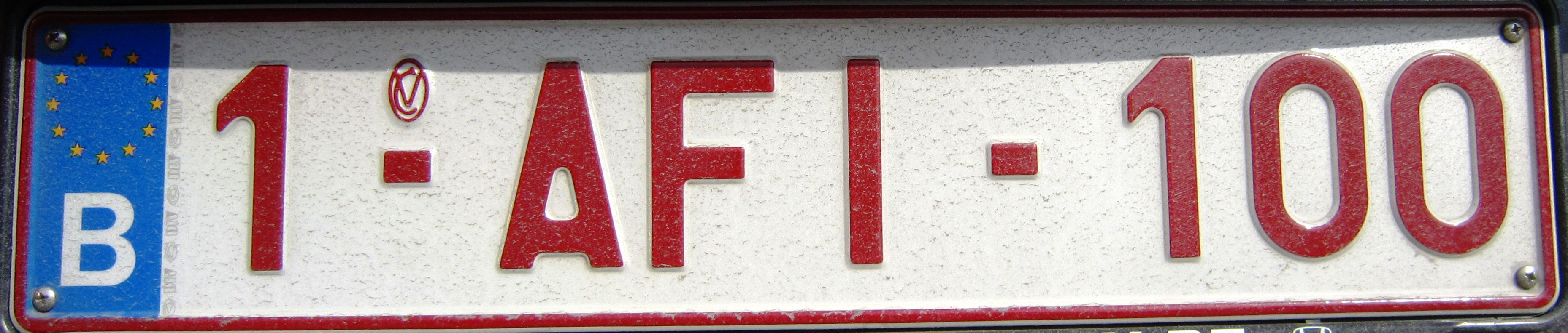 België kenteken EU